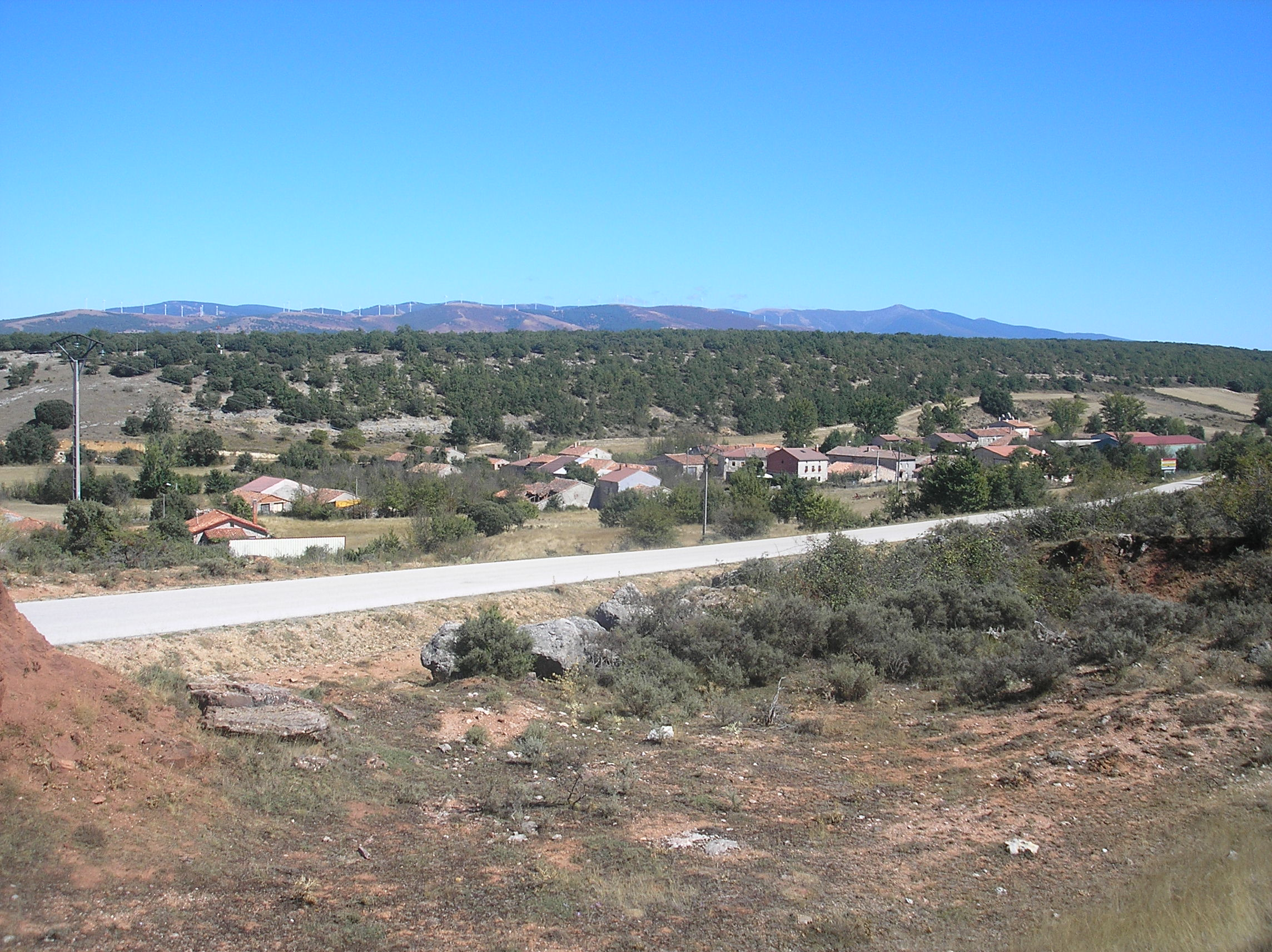 Vista general del pueblo de Cubillo del César (Burgos, España). Se trata de una pedanía del municipio de los Ausines en la comarca de Alfoz de Burgos. También pertenece al Partido judicial de Burgos y al arciprestazgo de Juan de Ortega.